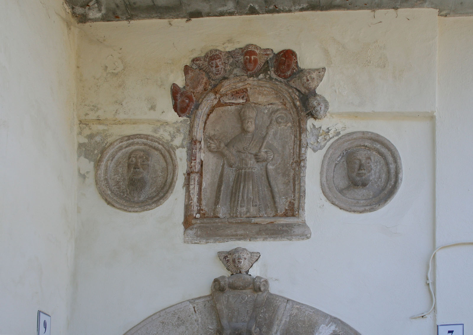 Pietracamela in provincia di Teramo, particolari del portale in pietra datato 1739. Interno del paese.